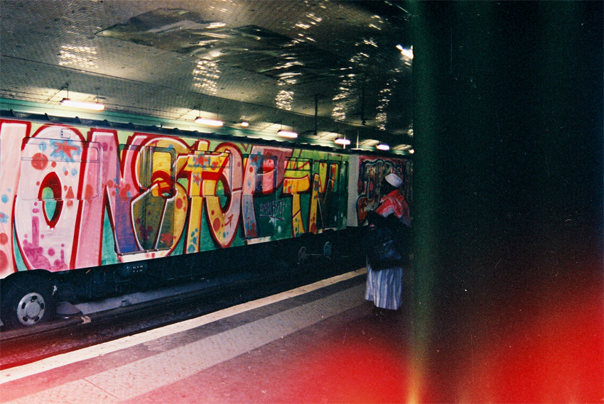 1992 / NON STOP graffiti / Premier Whole Métro parisien par les Duc & Tcp crew